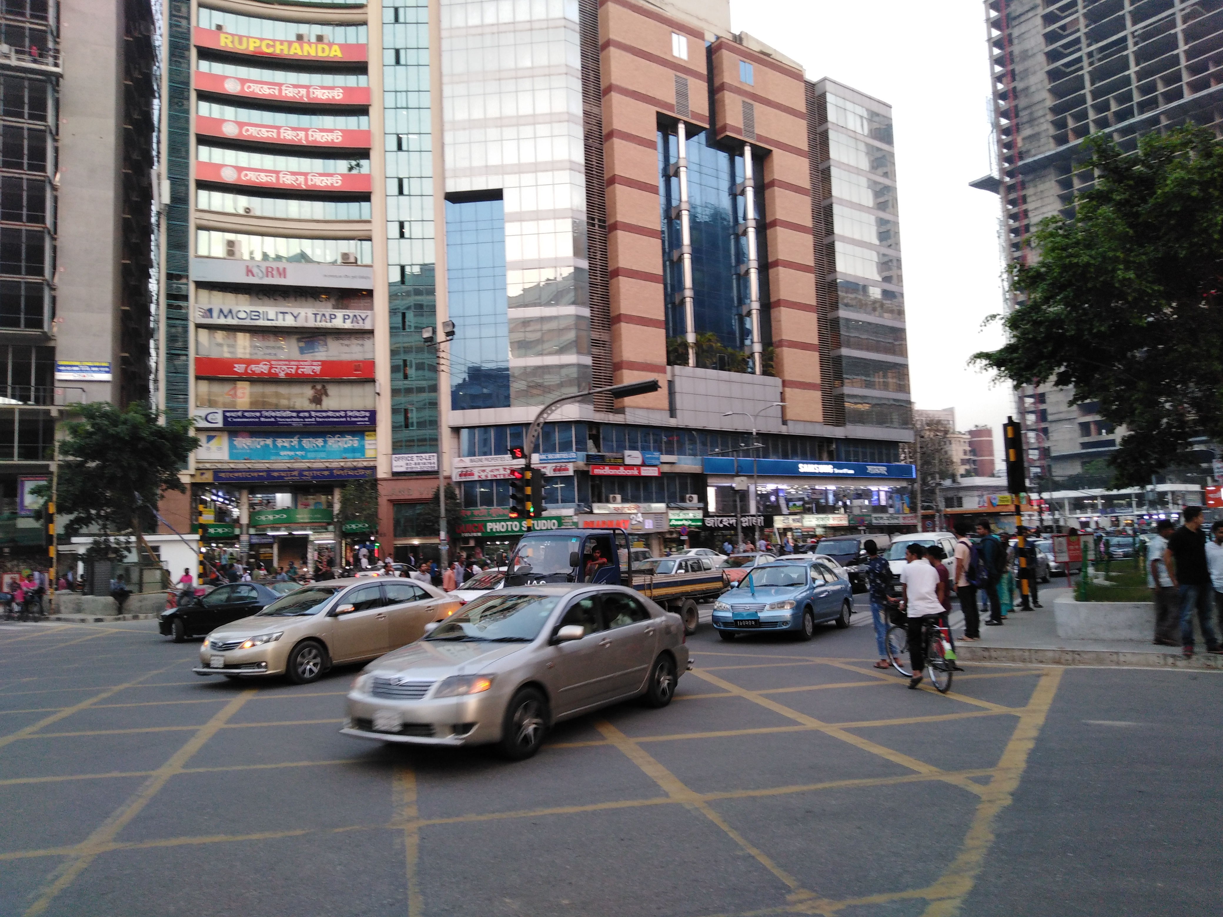 গুলশান ২ চত্বর, ঢাকা